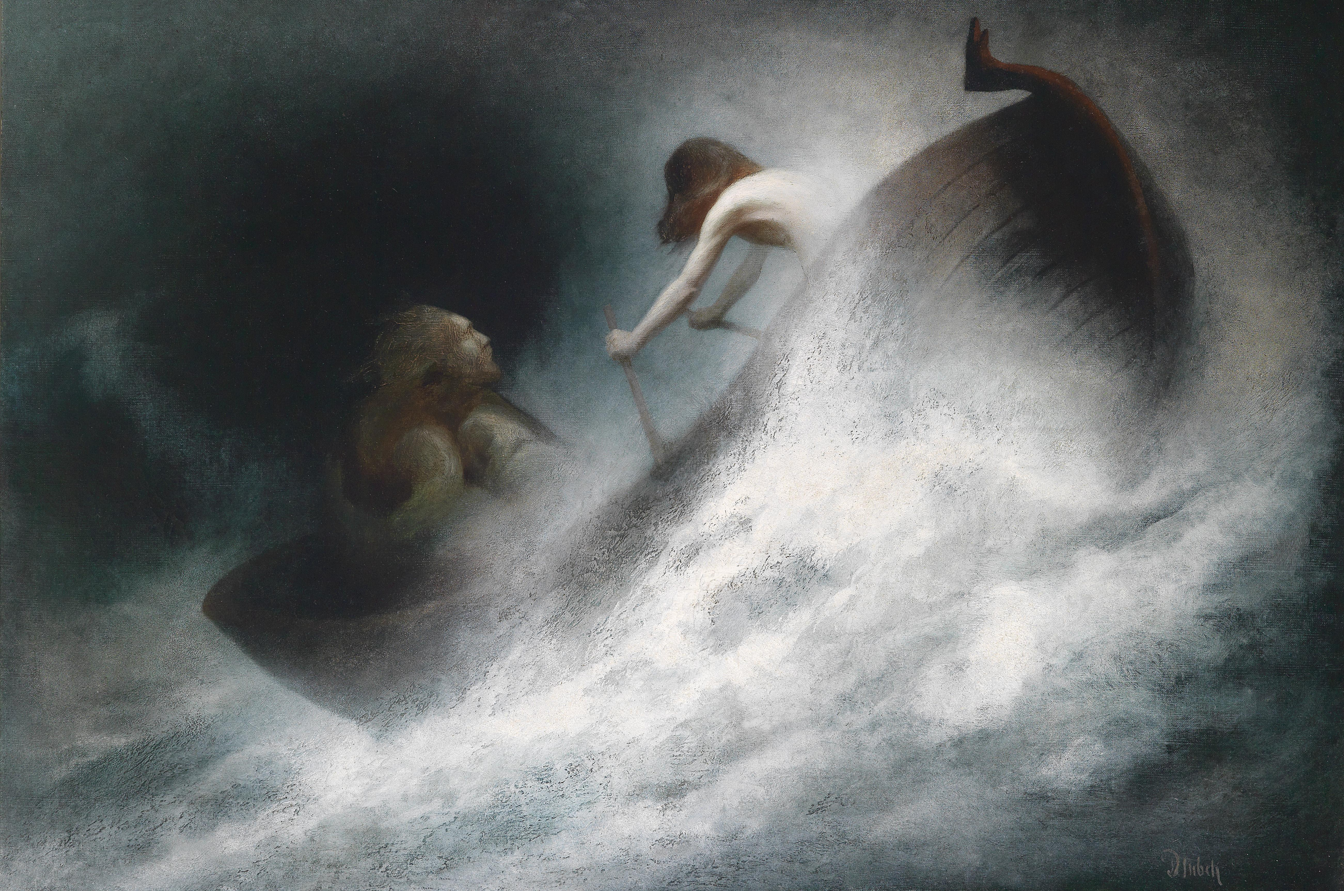 Der Rettung entgegen, signiert Dfnbch, Öl auf Leinwand, 100 x 151 cm